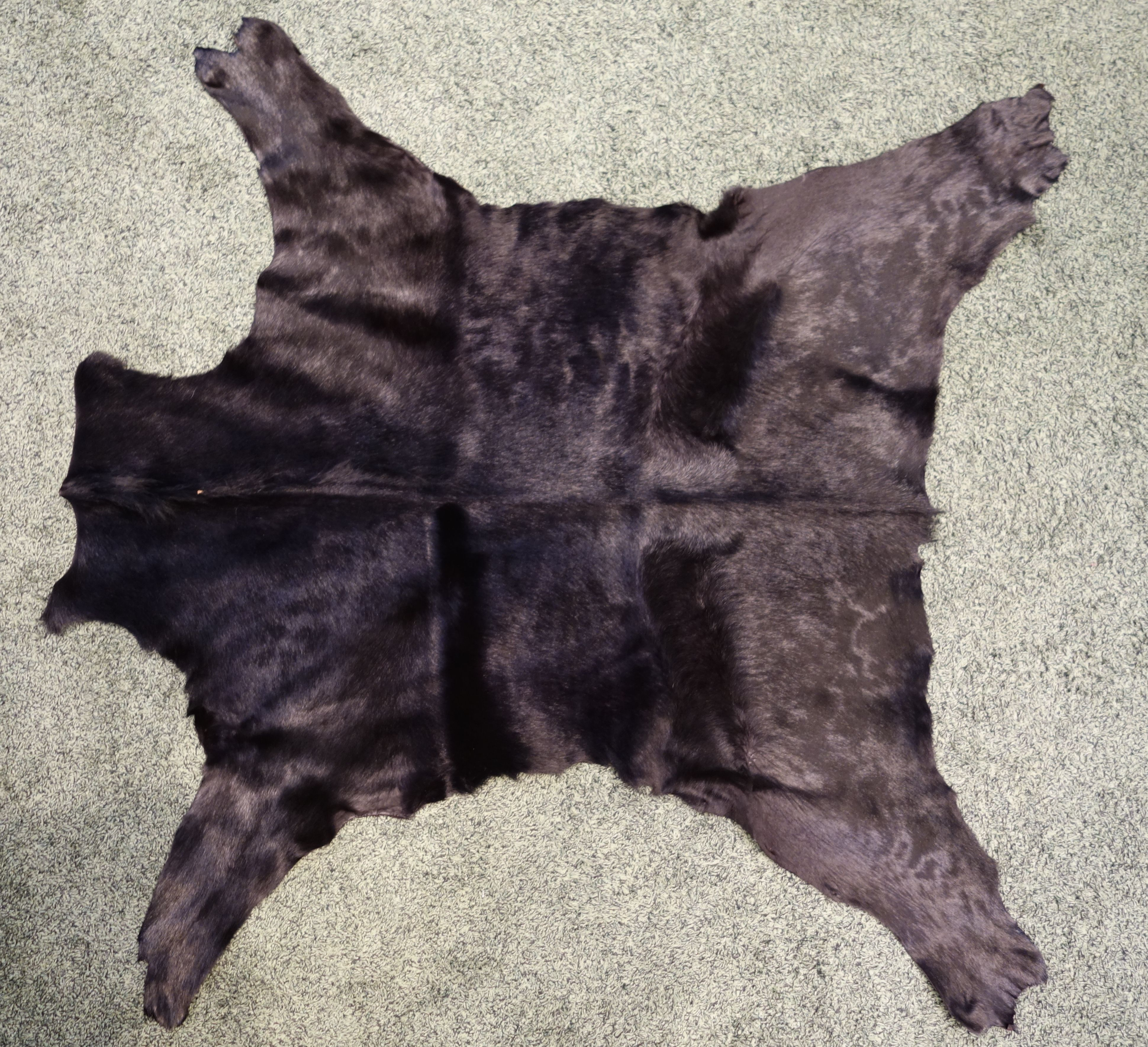 Schwarz gefärbtes Fohlenfell. Gesehen bei Chr. Schad Pelz -und Ledermode, Ludwigshafen.